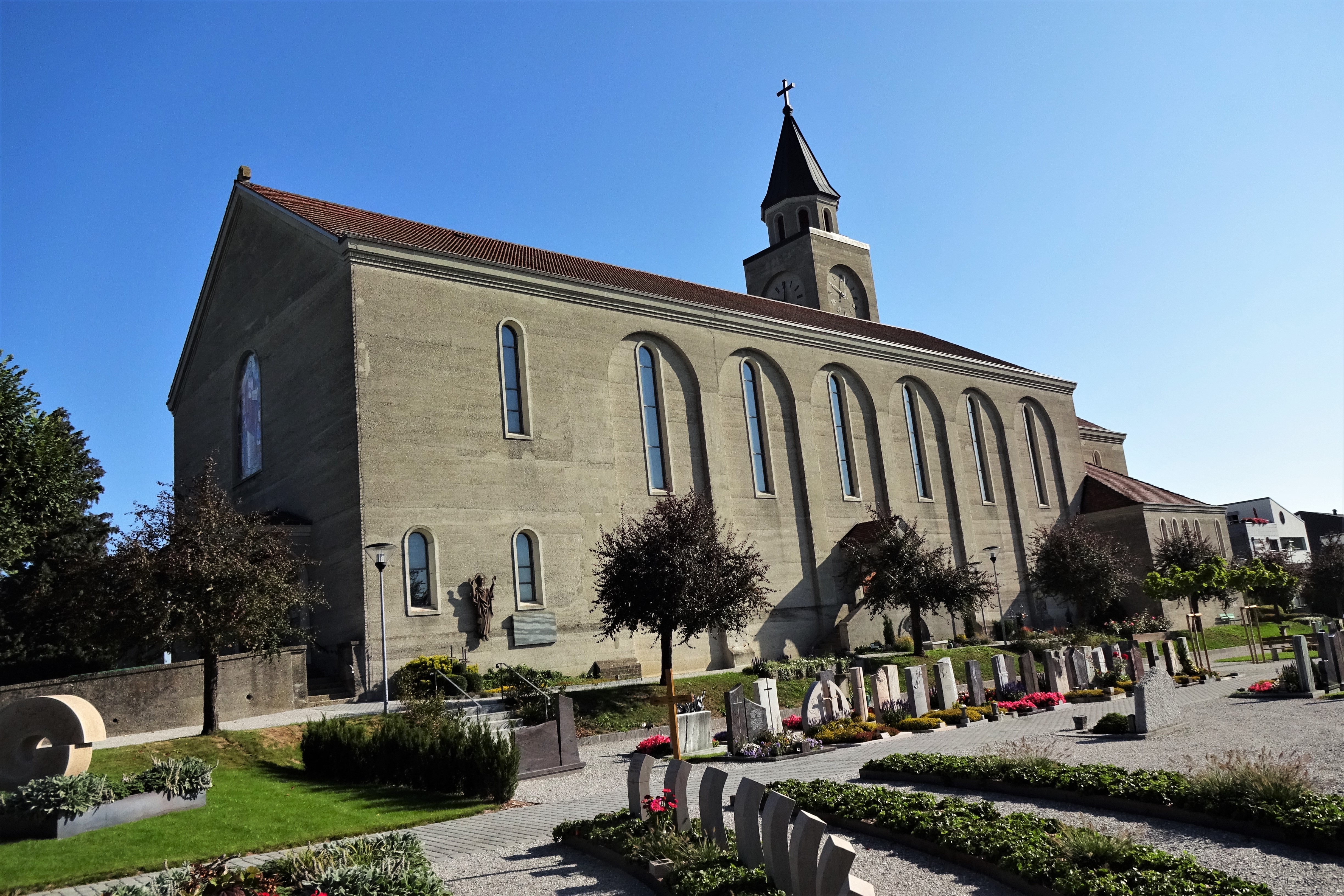 Wünnewil-Flamatt – Pfarrkirche St.Margaretha, KGS-Nr 13364 (Augustin Genoud-Eggis, 1932): Süd- & Westfassade (Hauptfassade)